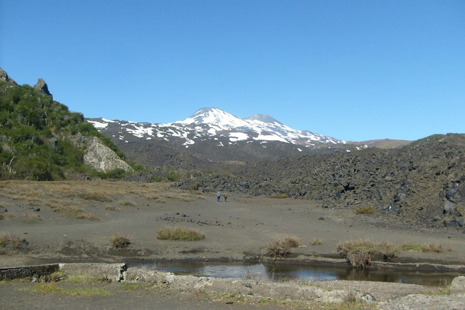 Interesantes cumbres características del paisaje de Ñuble, zona central de Chile, que son la fuente de numerosos ríos que riegan esta fértil zona, conocida desde muy antiguo por las abundantes y ricas aguas minerales que existen en sus laderas. Impresionantes son los escoriales que se pueden observar a lo largo del valle de Shangri-La, fruto de las últimas erupciones que tuvieron lugar durante la década de los ´80.